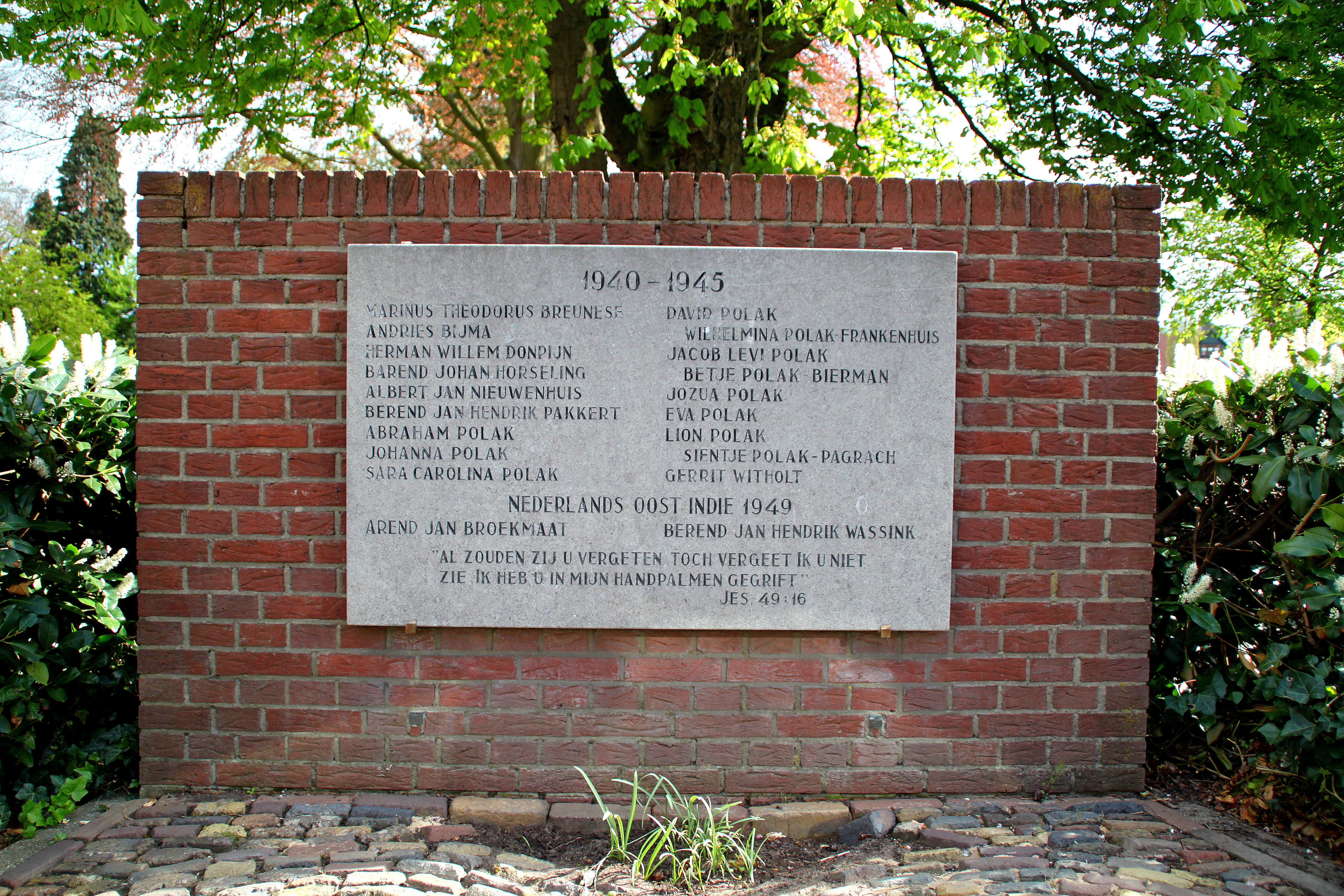 Bathmen - oorlogsmonument - 2014 - burgers